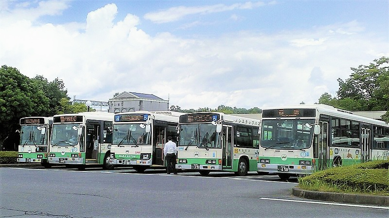 高の原駅前バスターミナルに並んだ奈良交通バス。